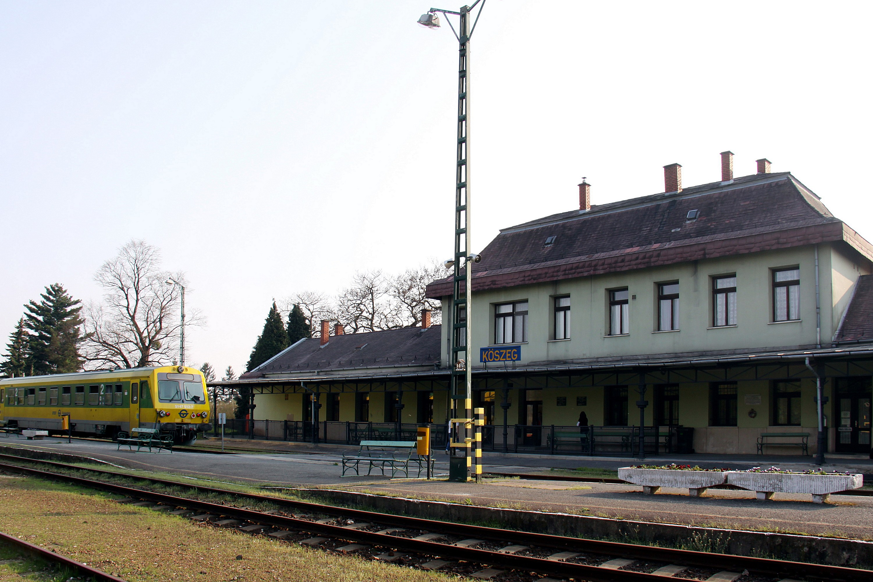 Lokalbahn Szombathely–Kőszeg - Bahnhof Köszeg.